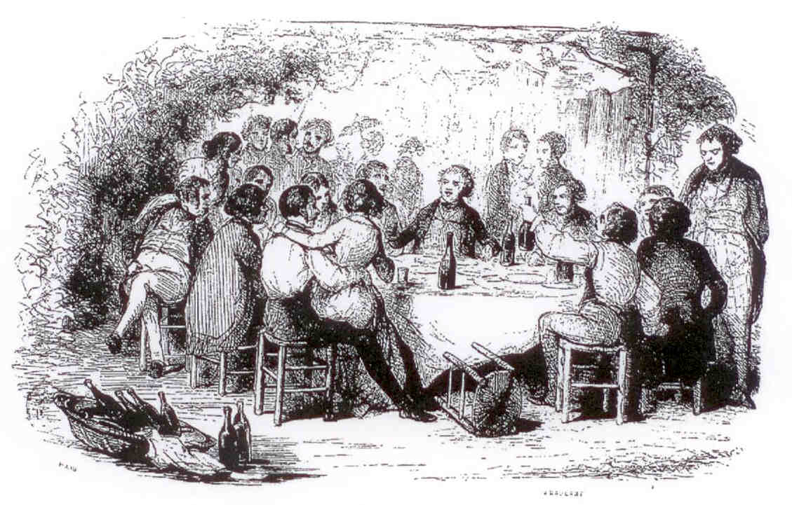 Une goguette de la région parisienne réunie sous une treille.